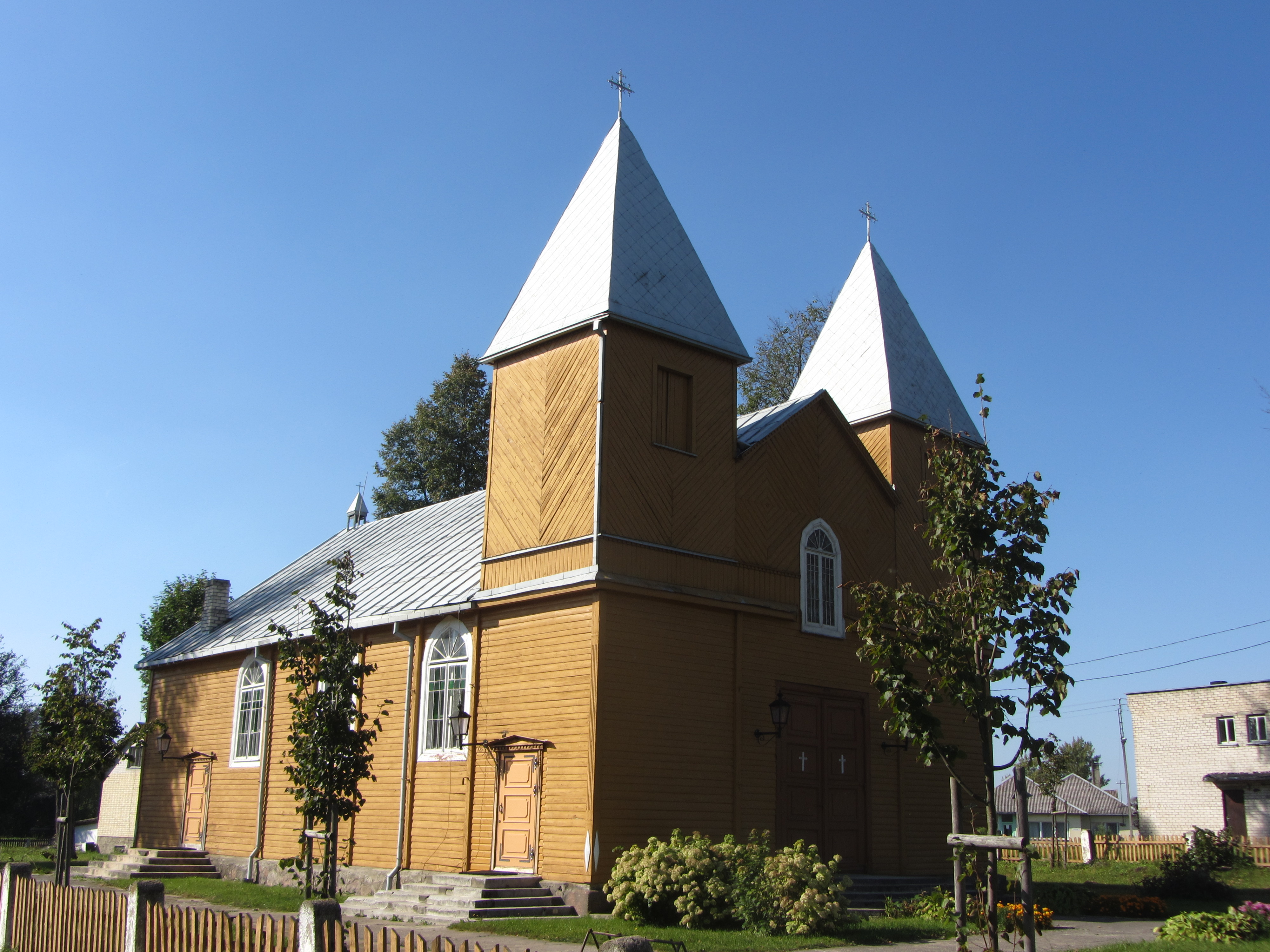 Žilinai, Lithuania